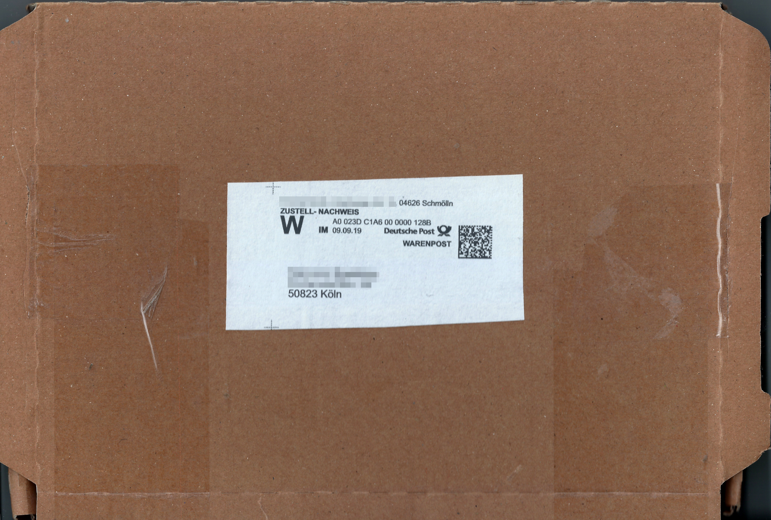 Briefsendung Deutsche Bundespost - Warenpost mit Zustellnachweis 2019